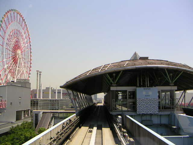 青海駅 投稿者が撮影(2004/06/04)